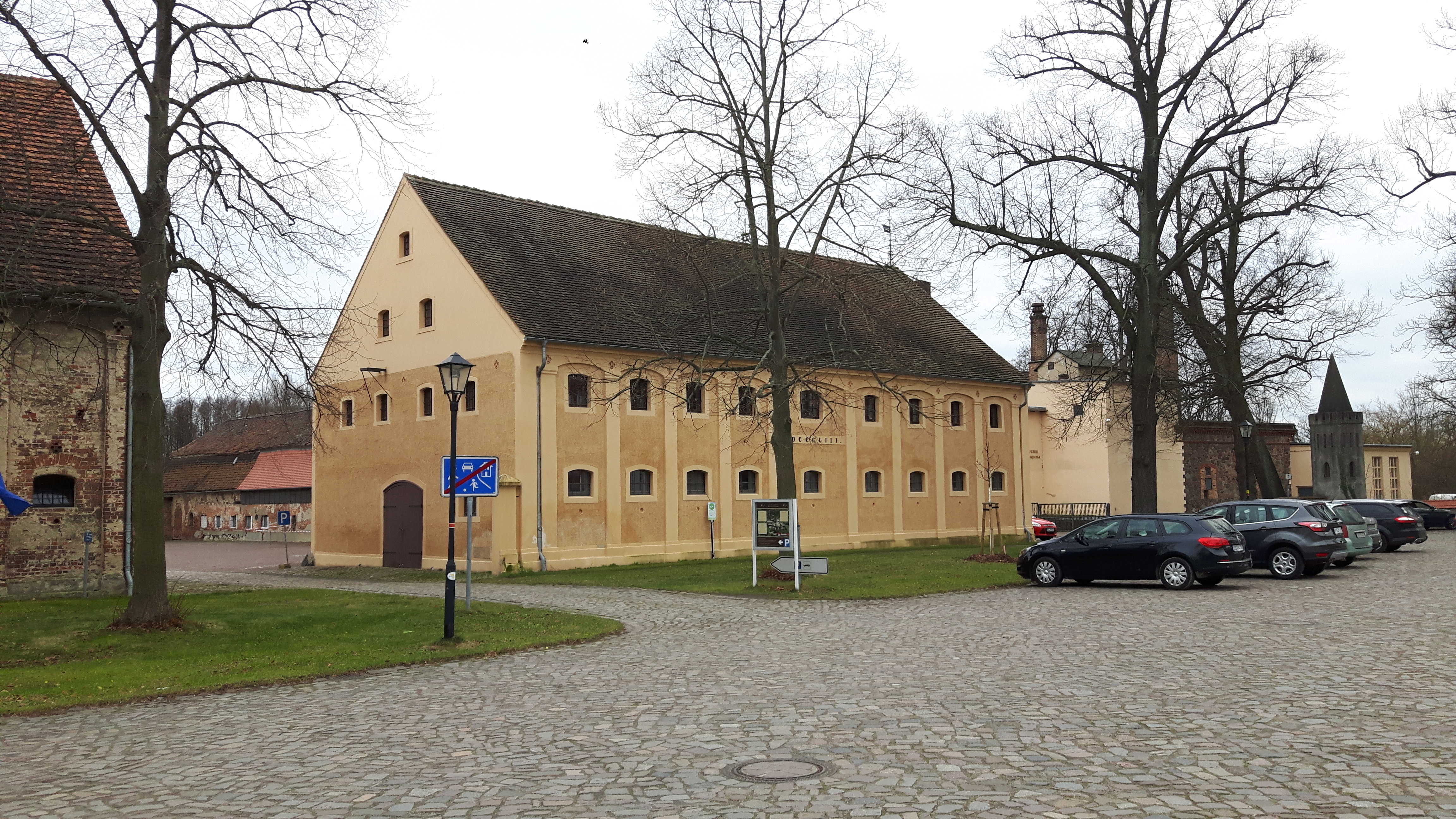 Gutshof Fürstlich Drehna.